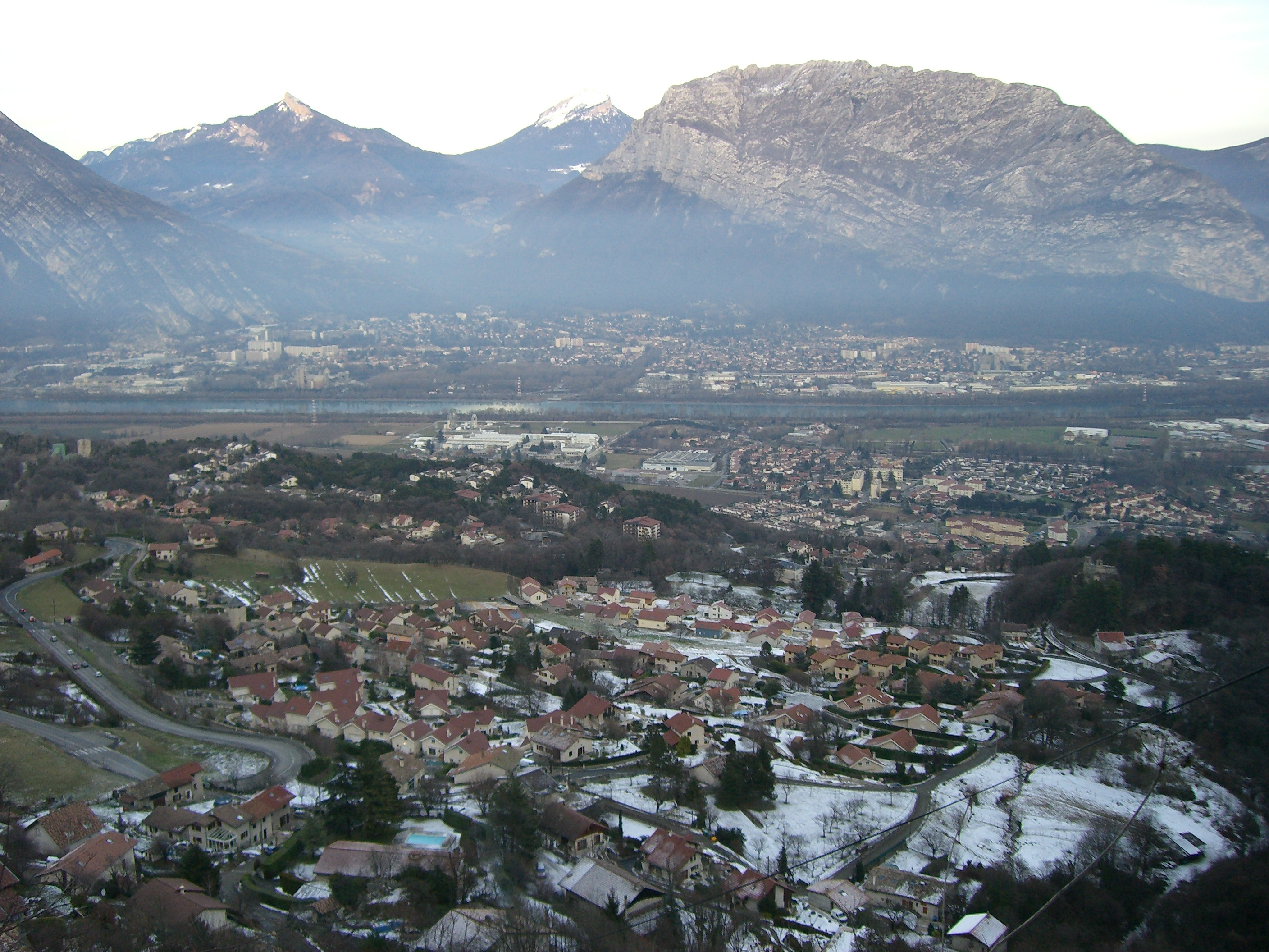 La commune de Sassenage - Vue de la Route de Villard-de-Lans.